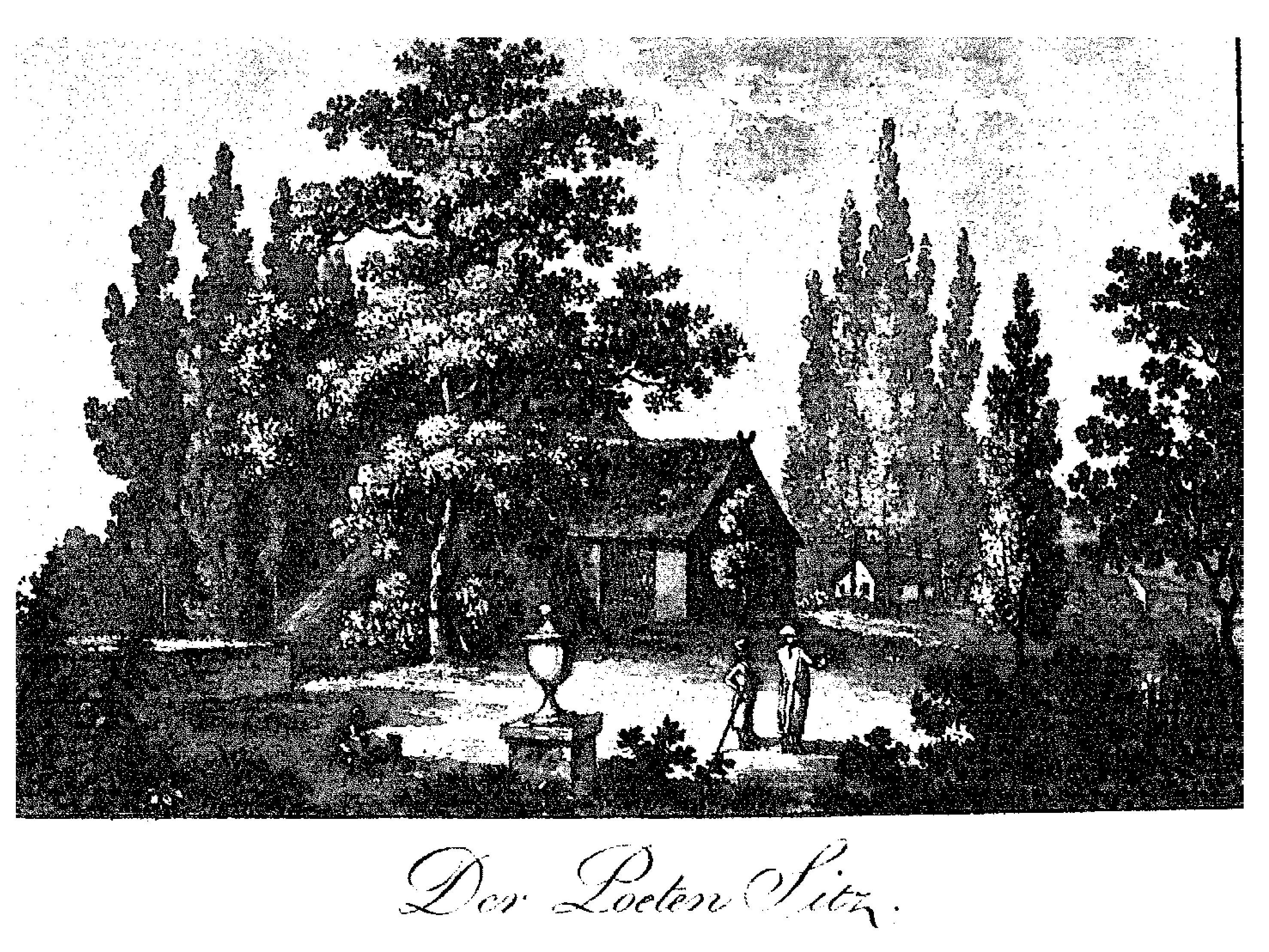 Frontispiz zur Iris 1805, Aquatinta nach Zeichnung von Ittners Tochter Josephine. UB Freiburg: E 5144–3 (Rara)